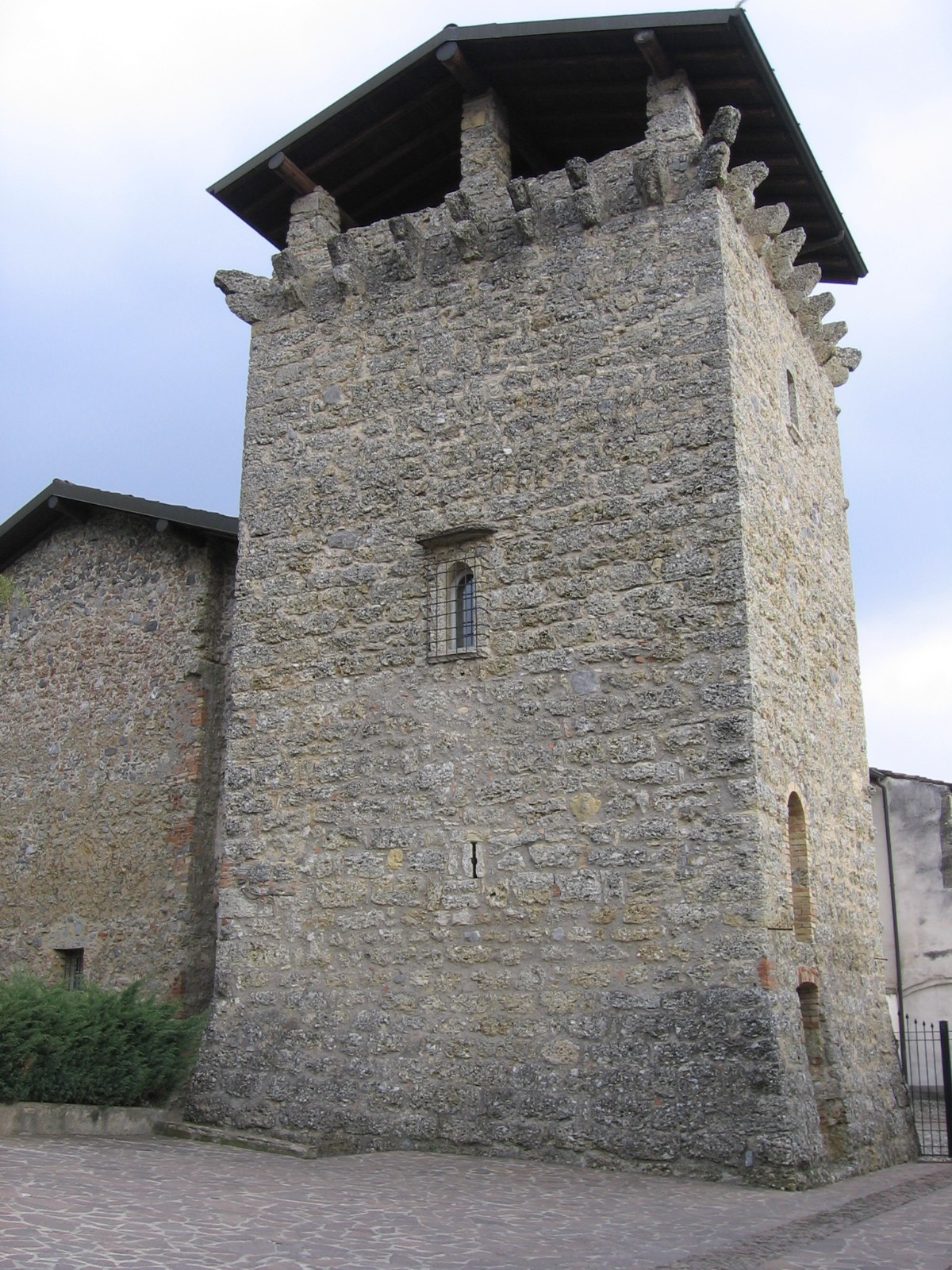 Cazzano Sant’Andrea, Bergamo, Italia